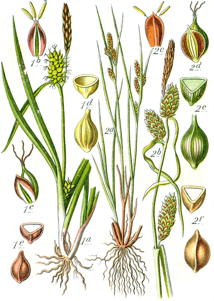 1. Carex viridula subsp. viridula, syn. Carex oederi Ehrh. non Retz. (1779)2. Carex extensa Gooden. Original Caption 1. Oeder's Segge, Carex oederi 2. Spindel-Segge, Carex extensa